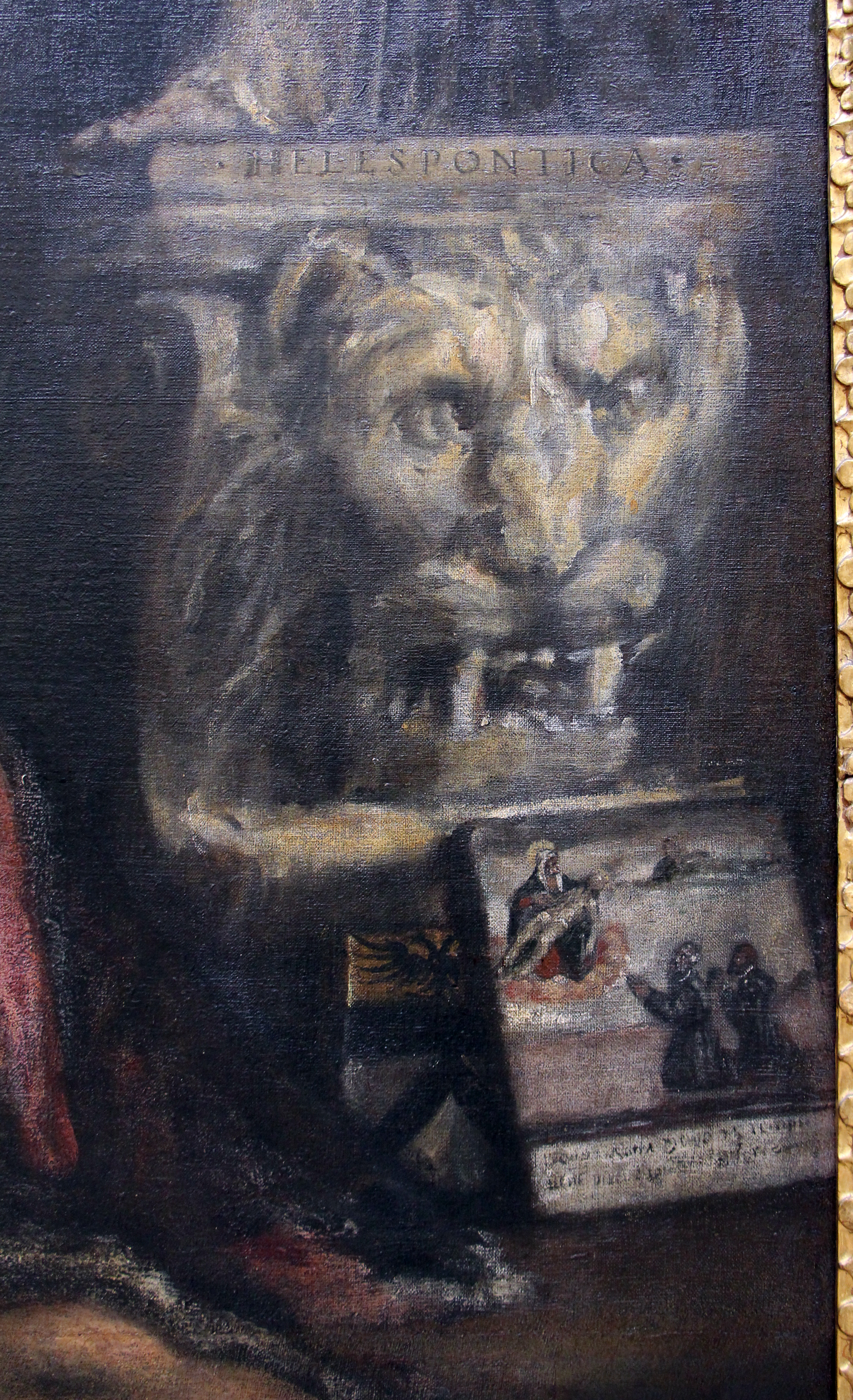 Gallerie dell'Accademia - MIBAC The making of this document was supported by Wikimedia CH. (Submit your project!) For all the files concerned, please see the category Supported by Wikimedia CH. This is a photo of a monument which is part of cultural heritage of Italy.